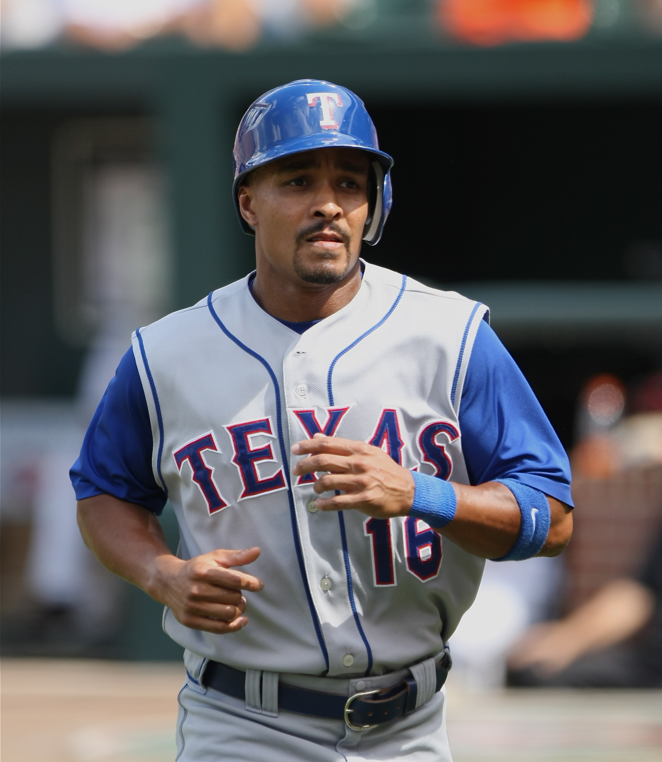 Jason Ellison